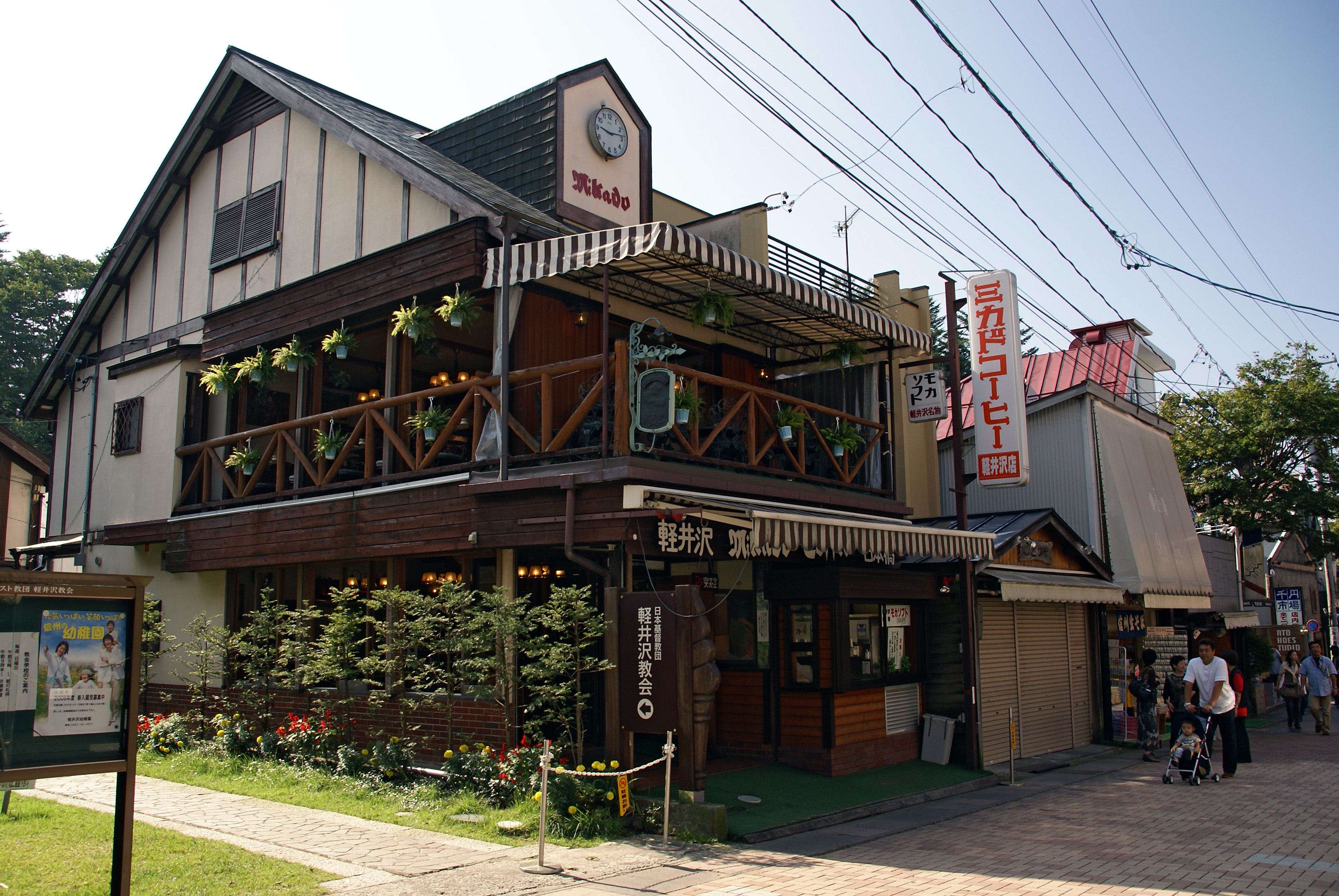 Old Karuizawa Ginza in Karuizawa, Nagano, Japan